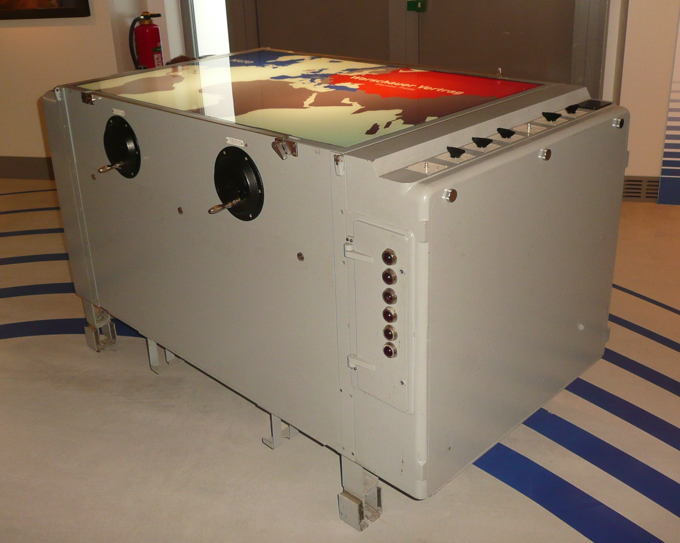 Plotttisch eines deutschen Schnellbootes aus den 1960ern. Typ D3 der Firma Nedinsco. Ausgestellt im Deutschen Marinemuseum Wilhelmshaven.